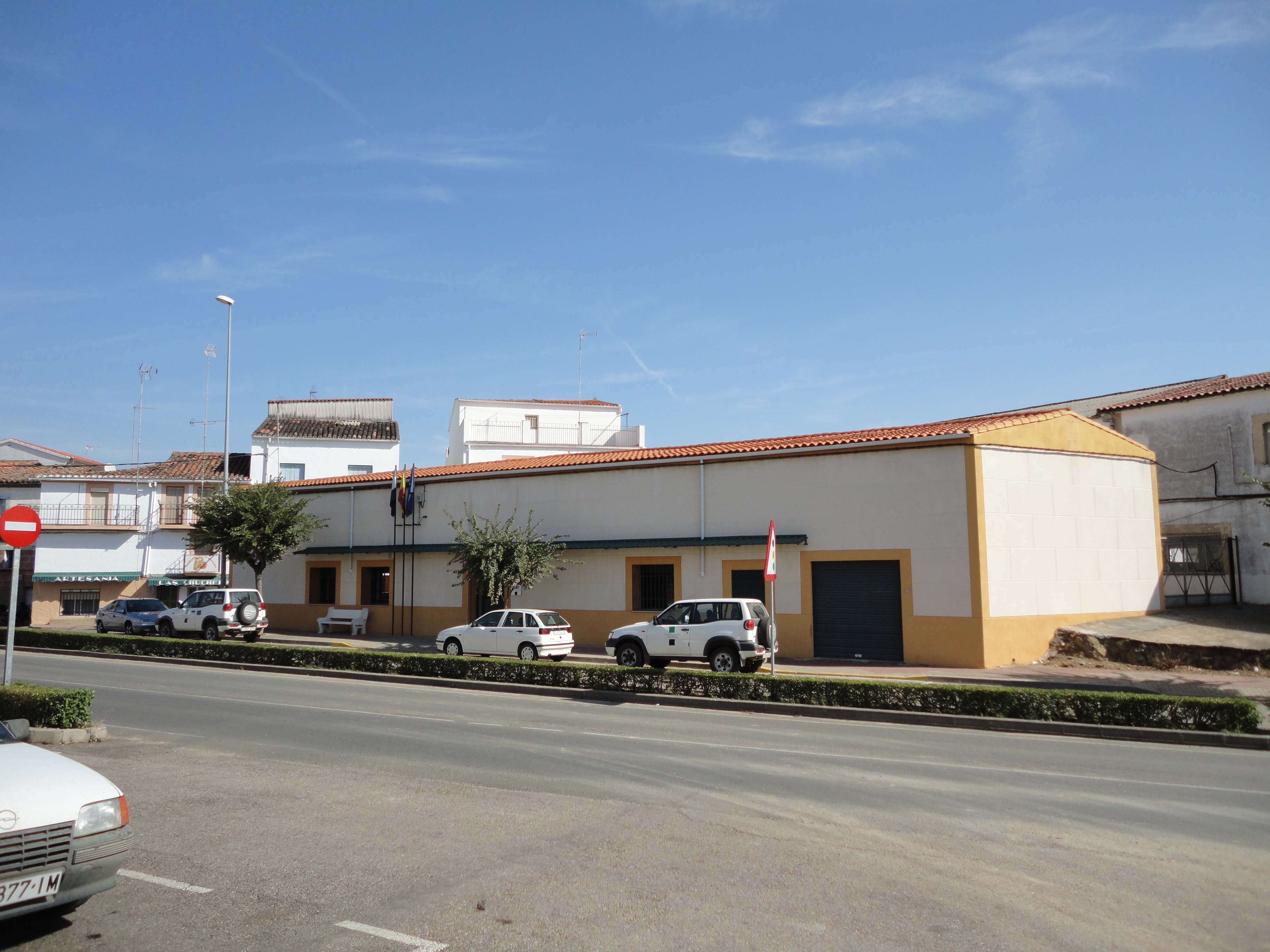 Edificio de servicios administrativos de la Junta de Extremadura en Montehermoso, provincia de Cáceres, España.